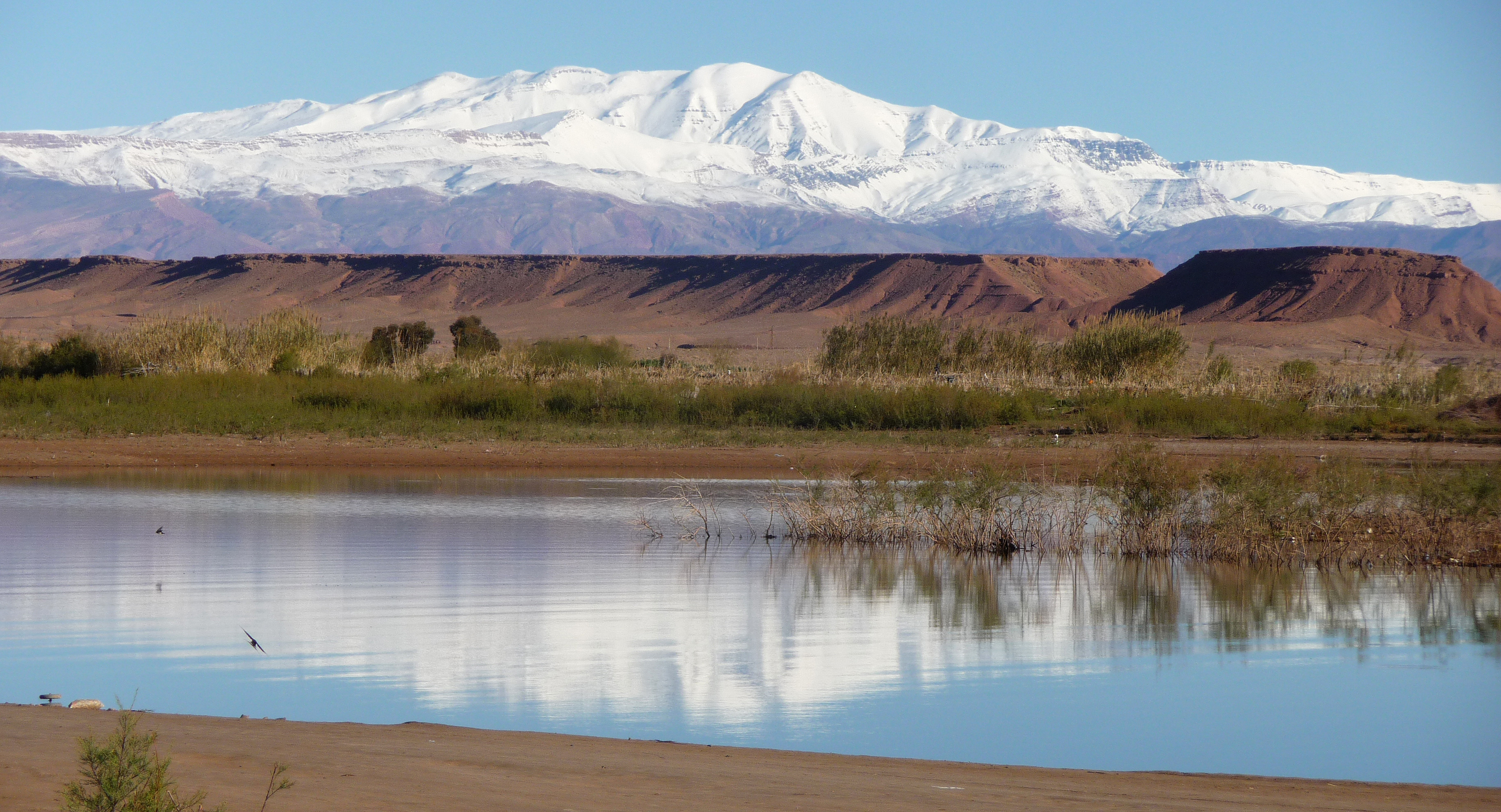 Barrage el Mansour Eddahabi